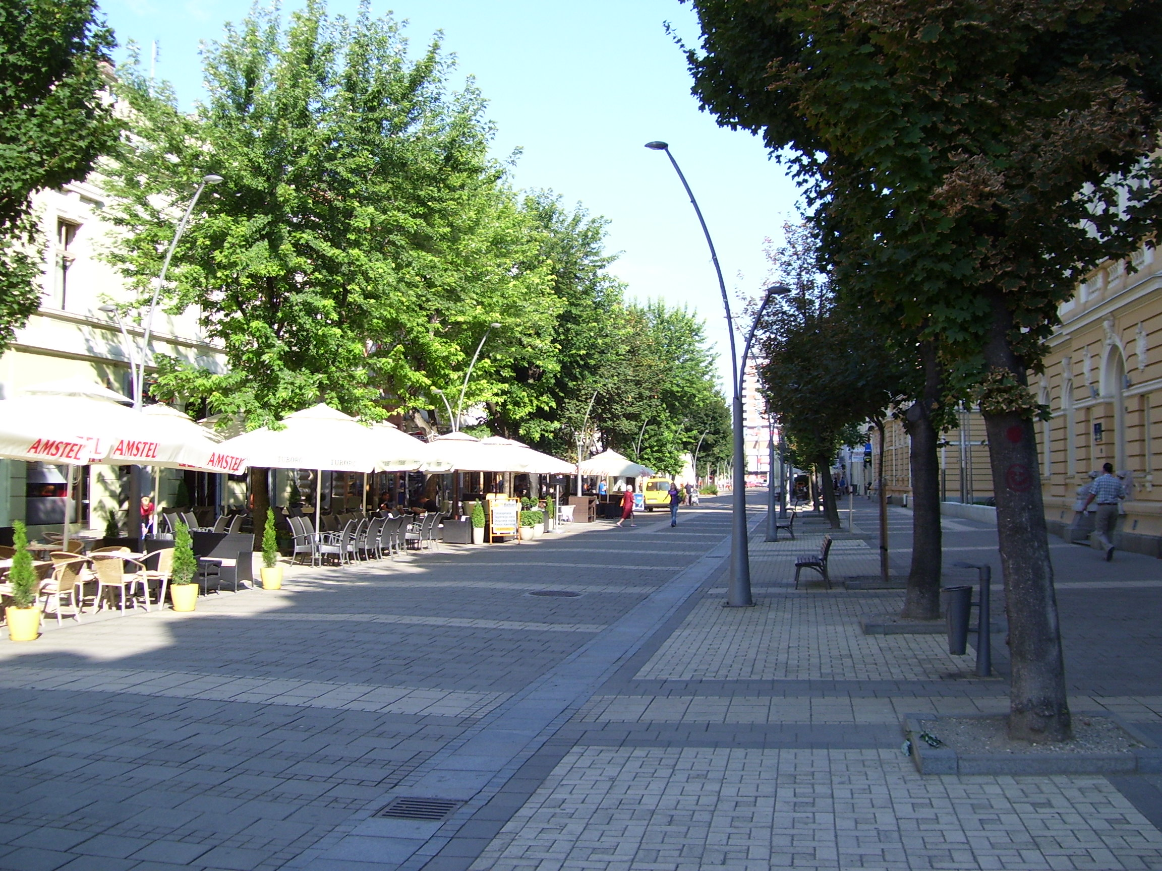 Улица Господар Јевремова у Шапцу. Аутор фотографије је корисник: SRB Maric IT. Слика је урађена обичним фотоапаратом.